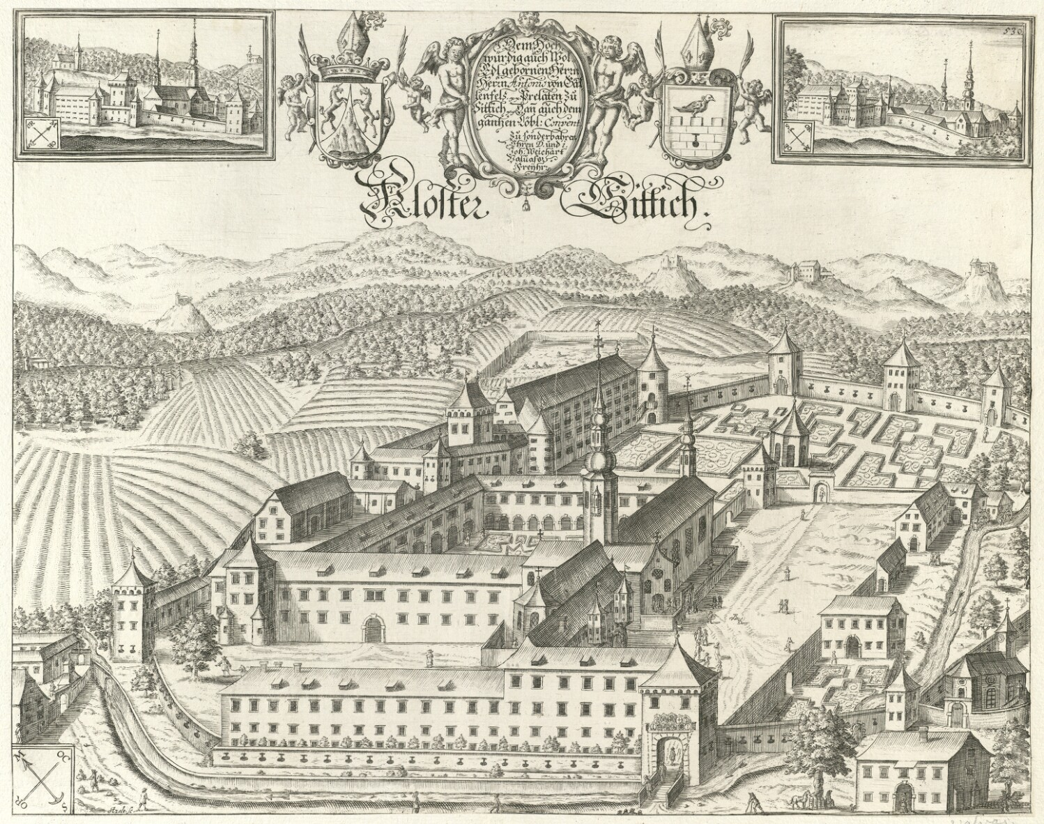 Samostan Stična